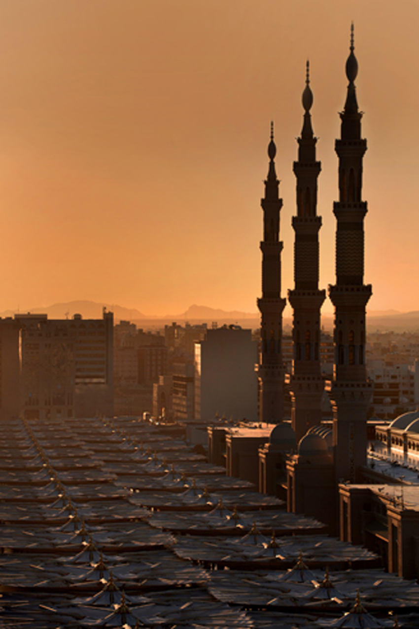 صور لمآذن المسجد النبوي تصوير الفوتوغرافي زياد خضر